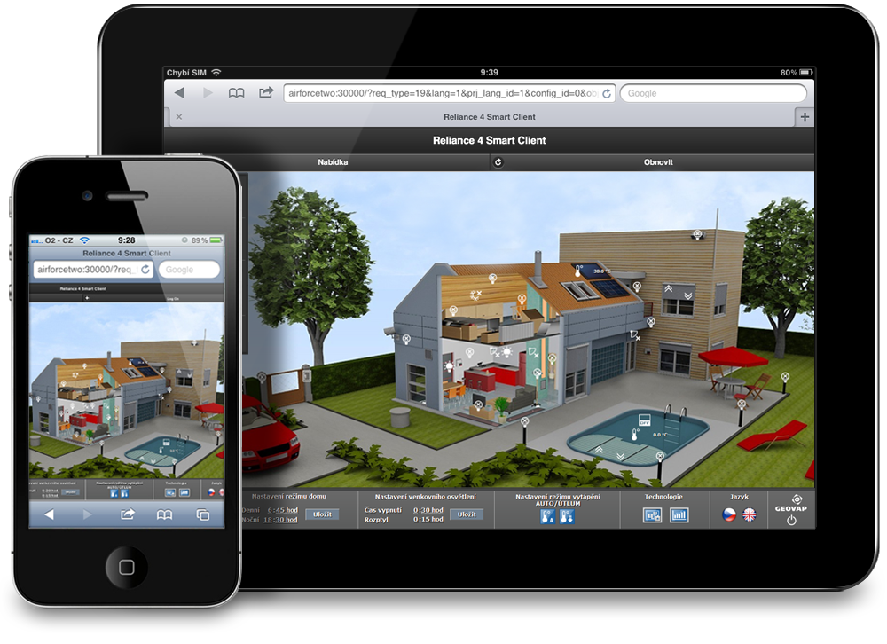 Ukázka vizualizace rodinného domu ve SCADA systému Reliance na tabletu a chytrém telefonu.